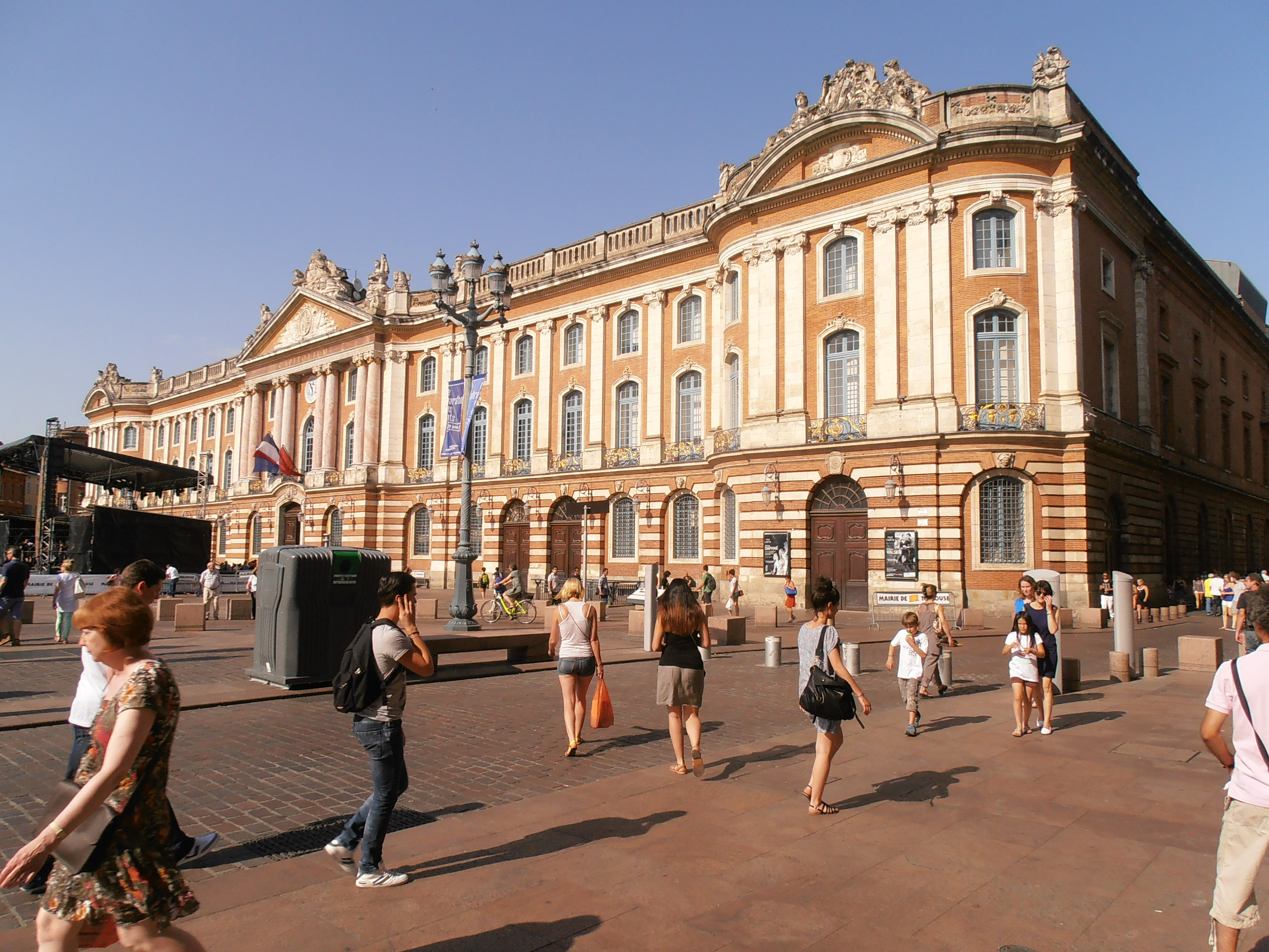 Capitole de Toulouse .